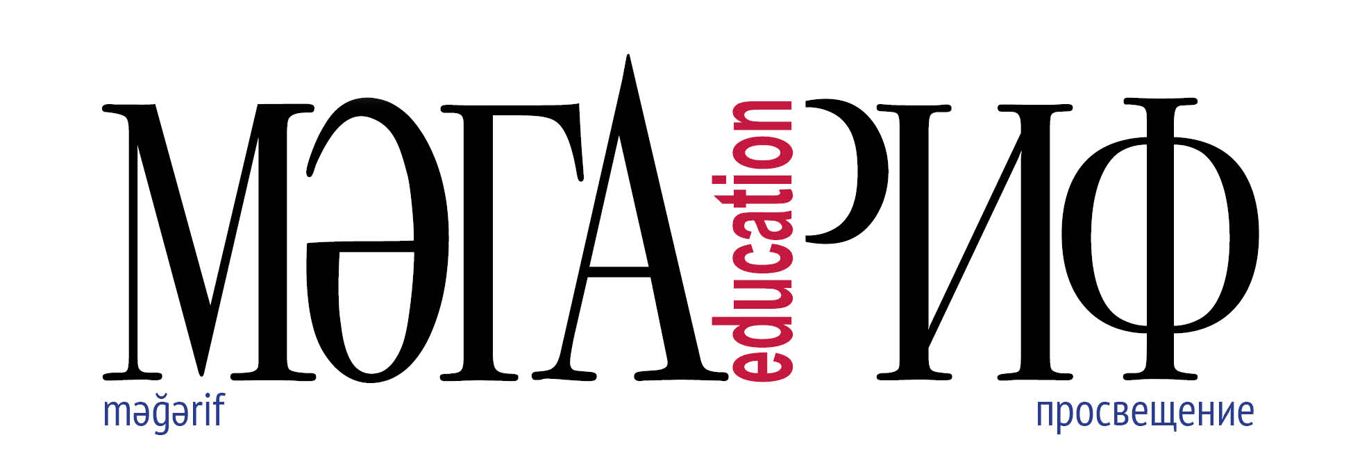 Лого журнала